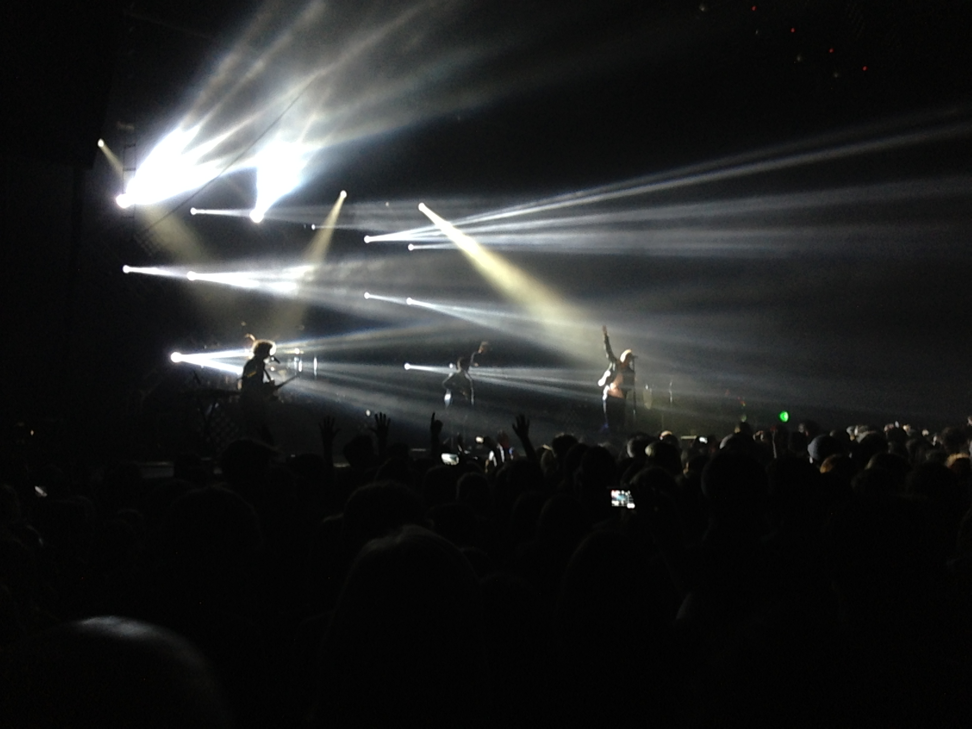 OneRepublic 2013/04/13 in Düsseldorf